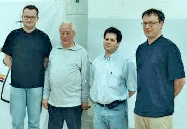 Vier Frankfurter Stadtmeister: Stefan Reschke (2000, 2002, 2003), Gerhard Hund (1956), Boris Margolin (1997) und Robert Schlamp (2001), 2002 in Solingen anläßlich der Deutschen Blitzmannschaftsmeisterschaft.